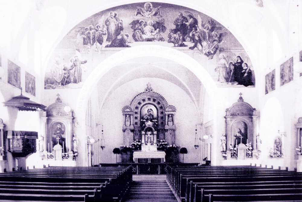 Kapuzinerkirche Aschaffenburg, Ausstattung von 1935 mit Kanzel, seitlichen Kreuzwegbildern und Chorbogenfresko